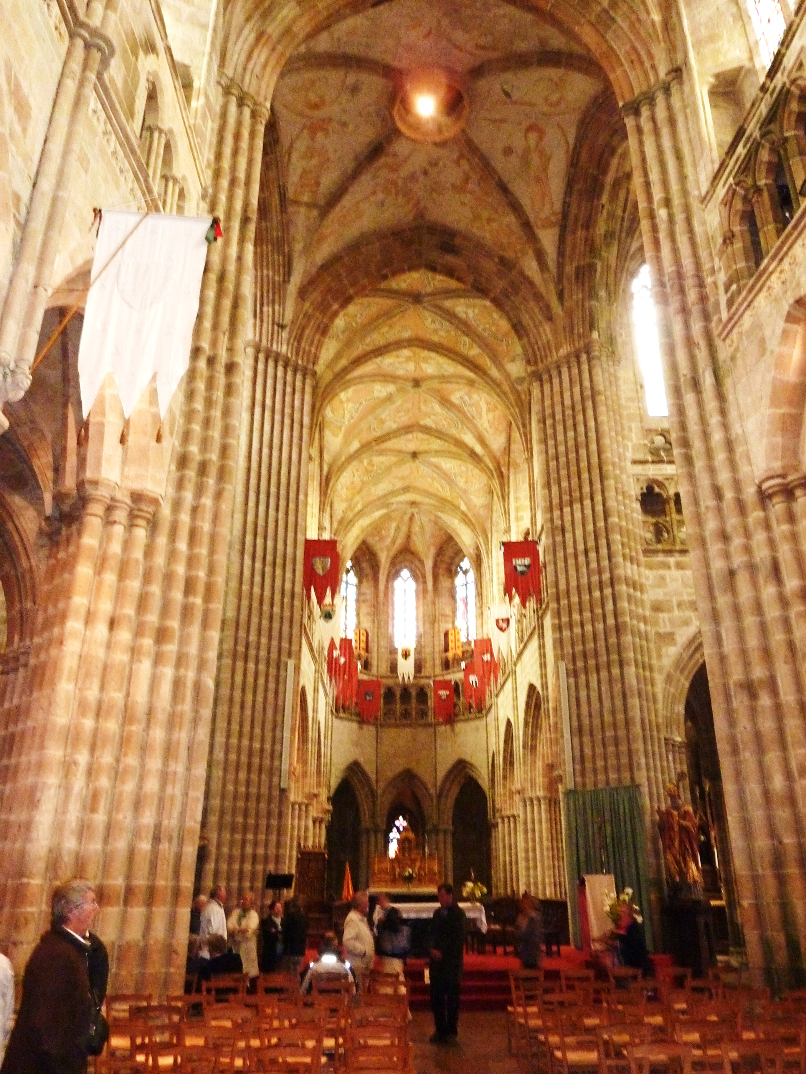 Tréguier: cathédrale Saint-Tugdual, la nef et le choeur